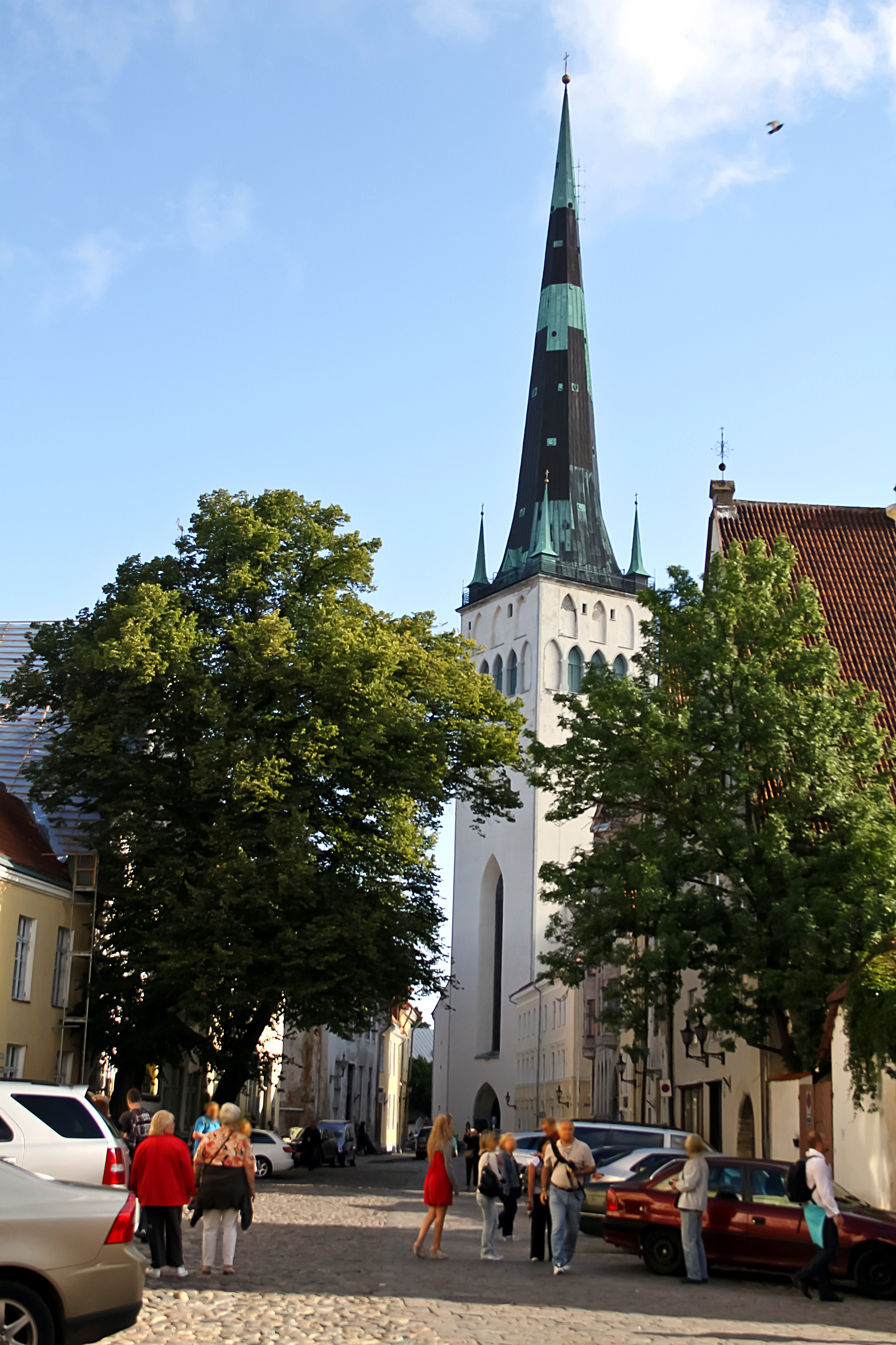 Reval